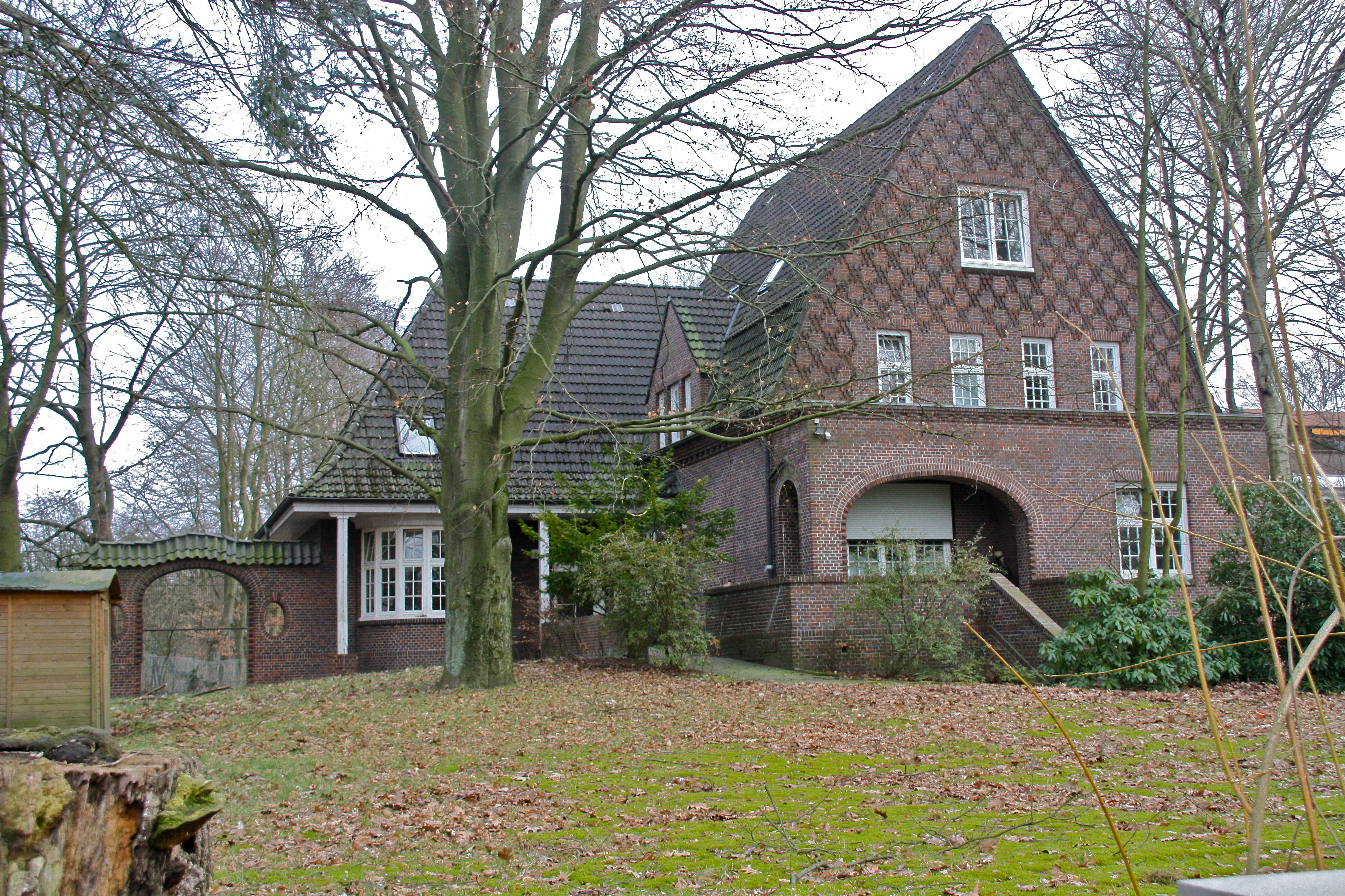 Hamburg-Rahlstedt, Villa Amtsstraße 79